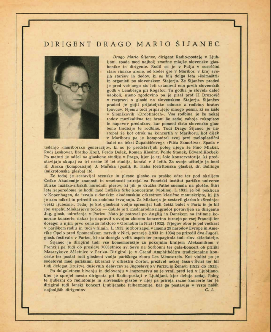 Biografía del director Mario Drago Sijanec incluida en el programa del "Concierto Eslavo" de Filarmónica Ljlubiana, dirigida por Mario Drago Sijanec (en esloveno). c. 1940.